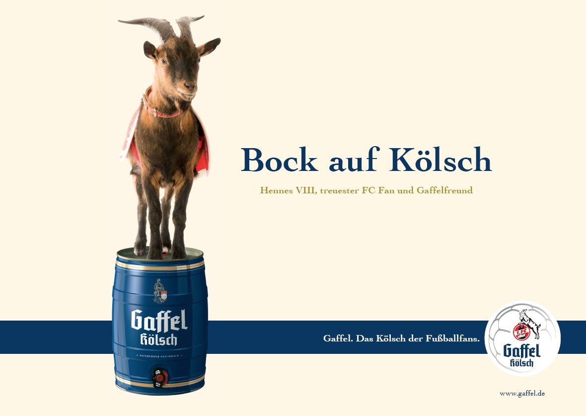 Privatbrauerei Gaffel Becker & Co: Werbeplakat mit Hennes VIII vom 1. FC Köln